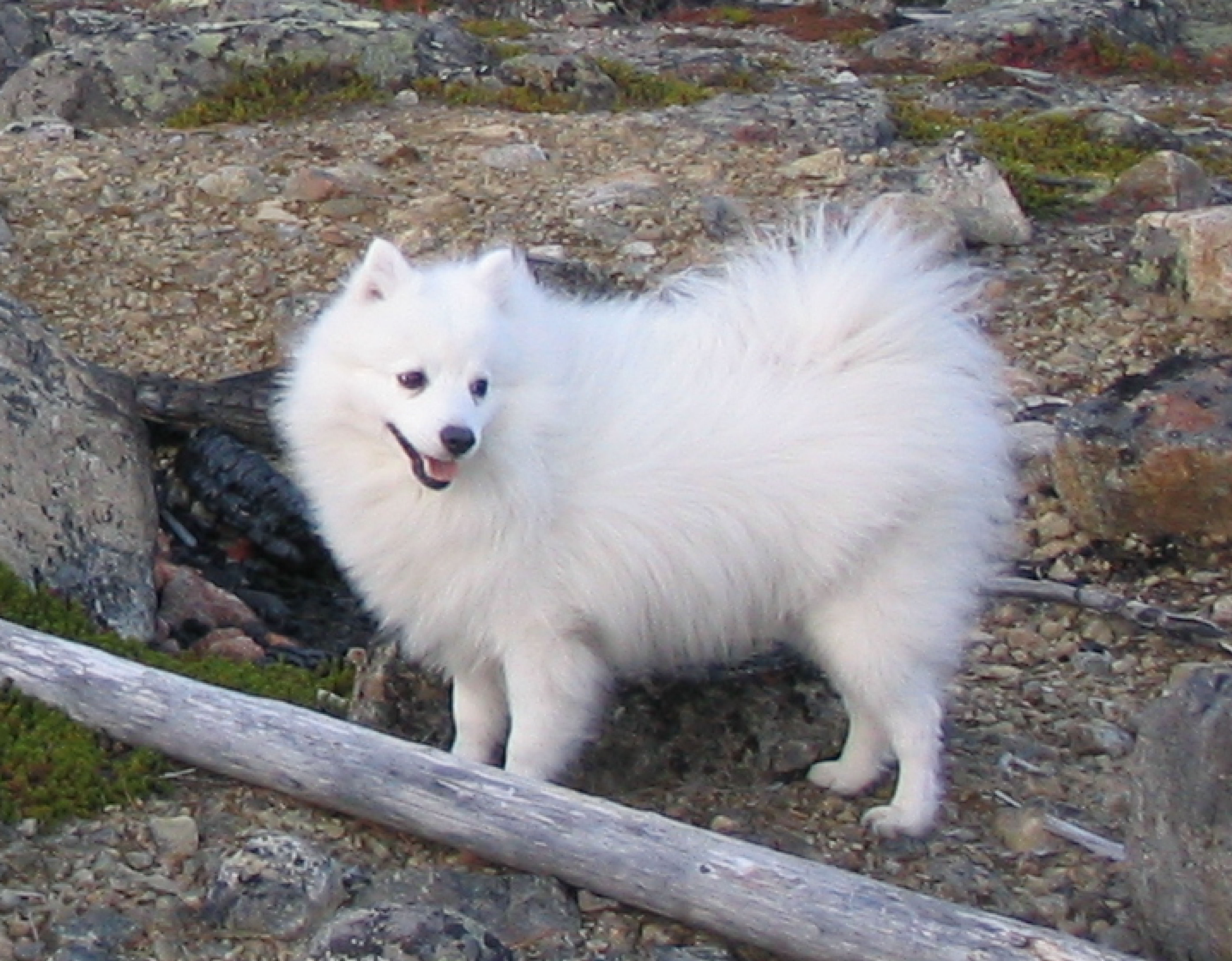 Spitz japonés en la montaña.